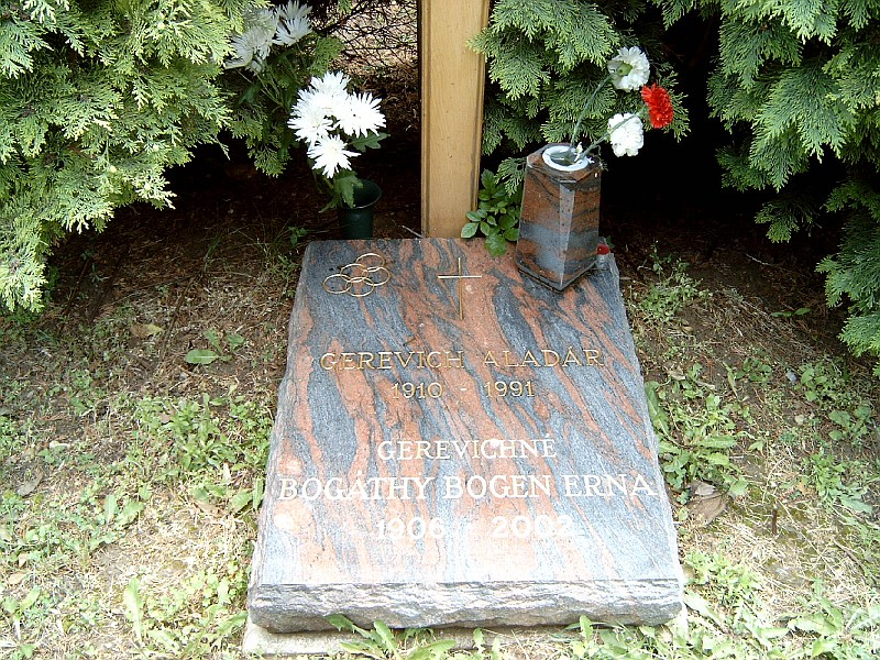 Gerevich Aladár és felesége, Bogen Erna sírja Budapesten. Farkasréti temető: 60/2-főút-3.